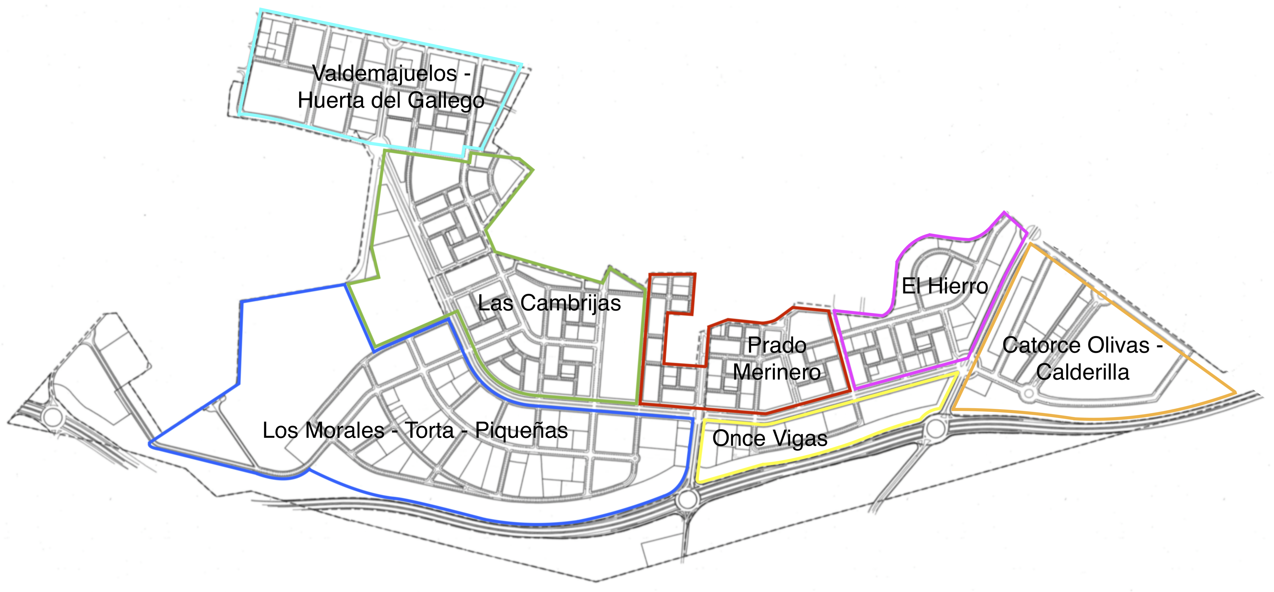 División administrativa, social e histórica de las diferentes zonas o sub-barrios situados en el nuevo Barrio de La Peseta